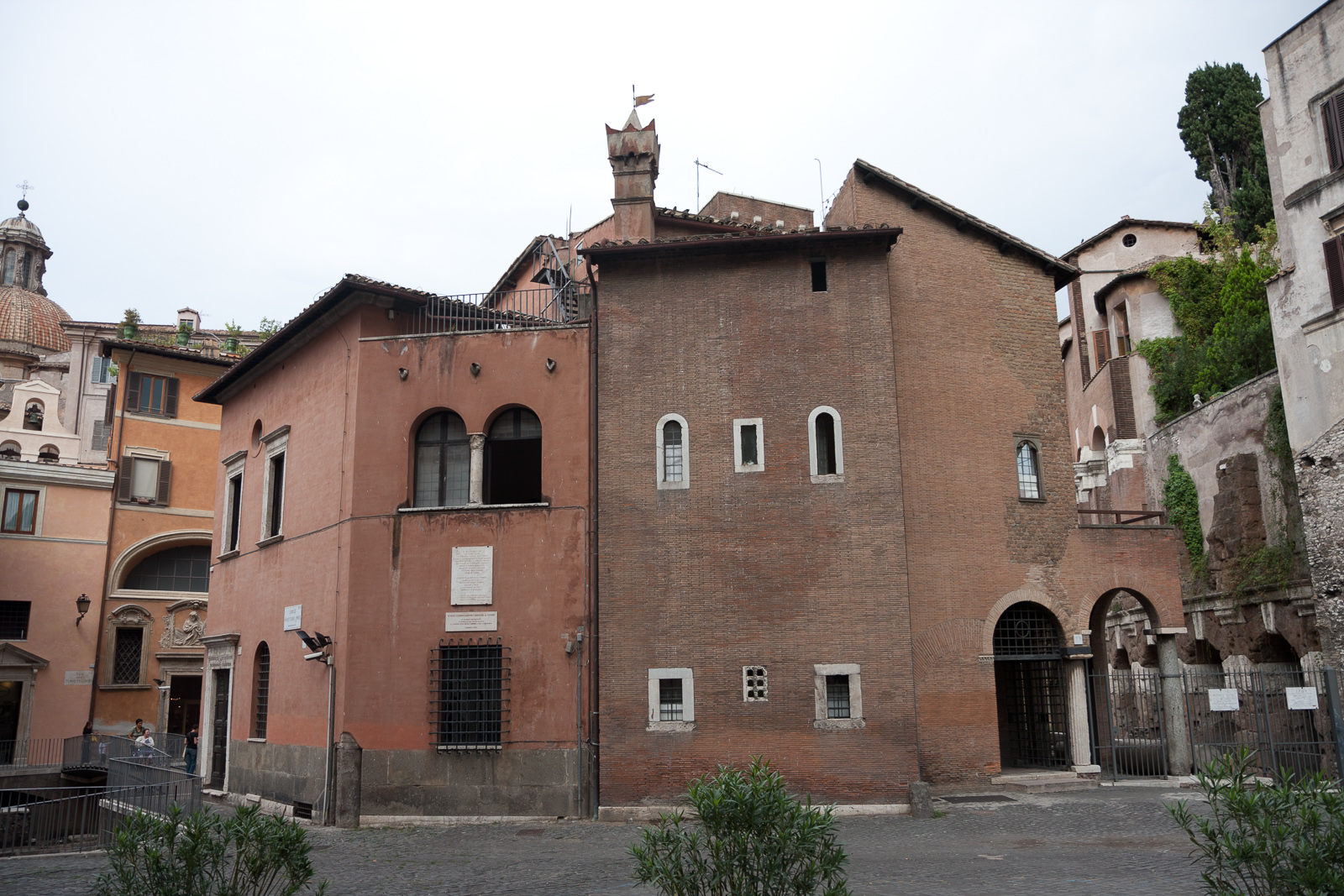 Rione XI Sant'Angelo, 00186 Roma, Italy